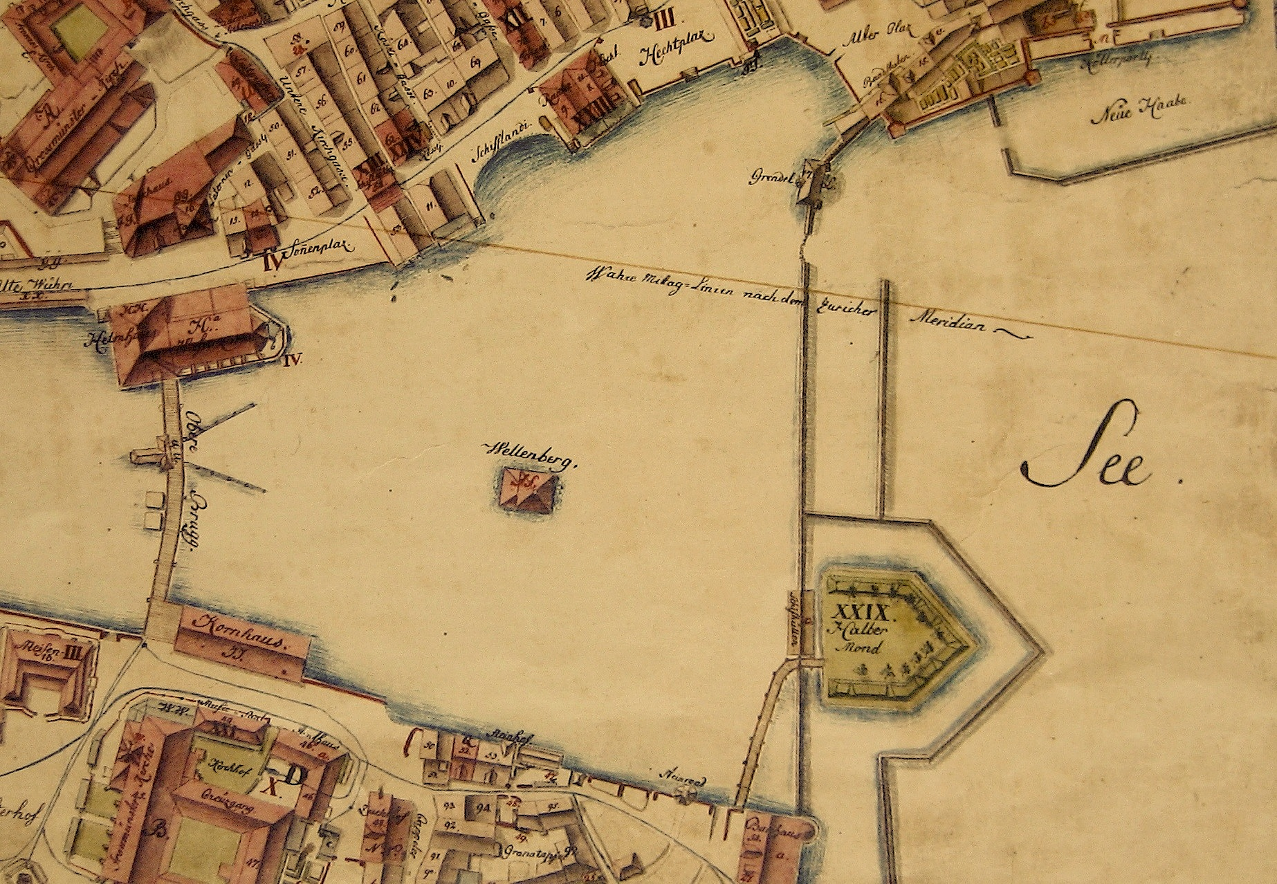 Der obere Limmatraum mit dem Kratzquartier, Wellenberg, Grendeltor und u.a. Bauschänzli auf dem Müllerplan von 1793